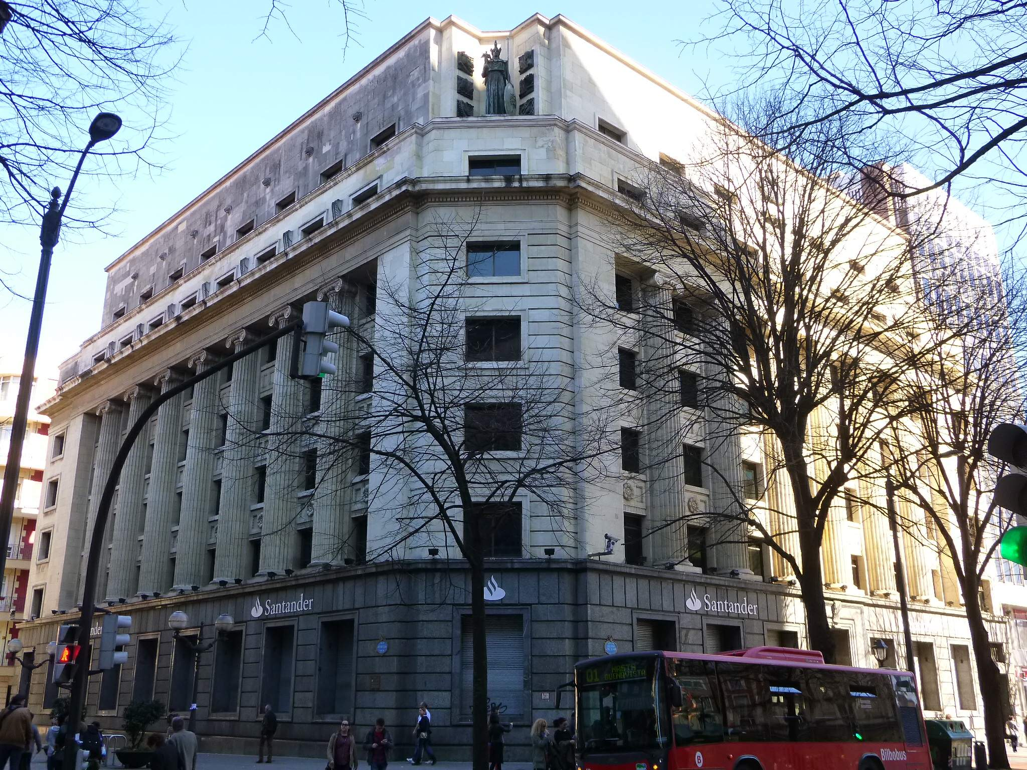 Edificio del Banco Santander, en Bilbao